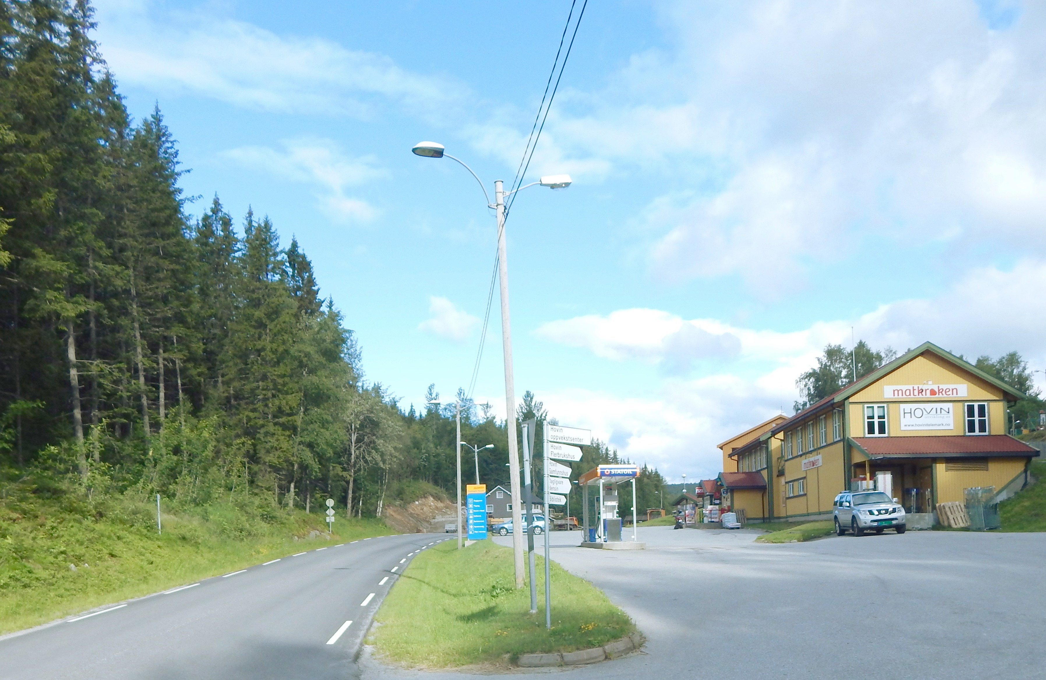 Primær fylkesvei 364 i Hovin i Tinn